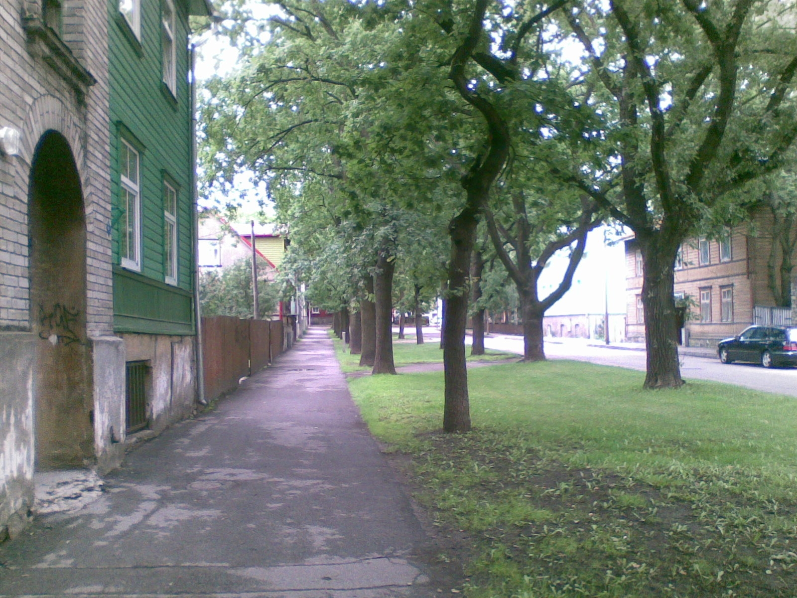 Heina tänav Tallinnas, Pelgulinnas.